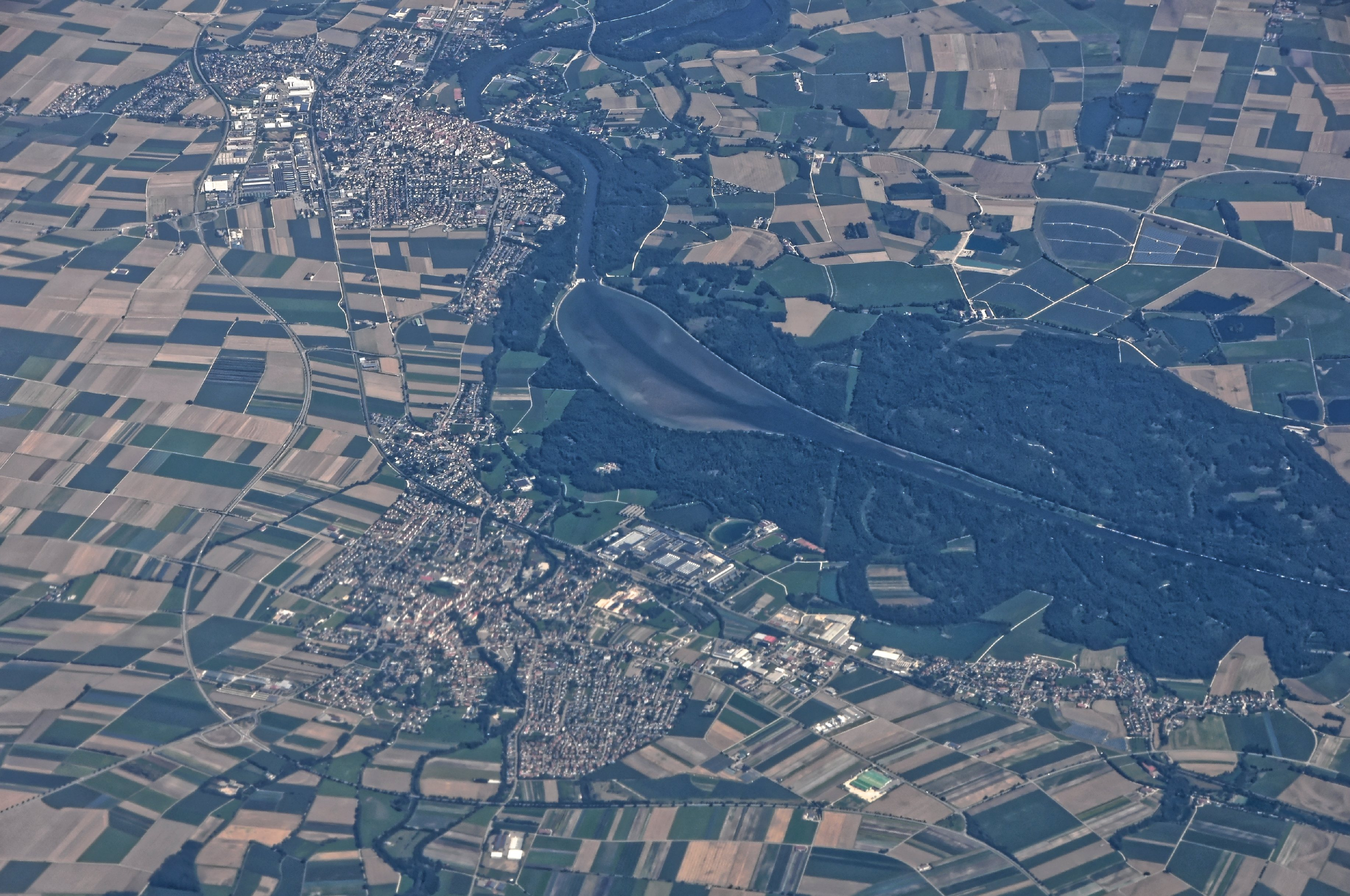 Bilder vom Flug -Rom-Düsseldorf-Hamburg 2013 Dieses Foto entstand in Zusammenarbeit mit Stadtbesichtigungen.de Die Seiten Stadtbesichtigungen.de, der dazugehörige Reise Blog sowie die Facebookseite: Stadtbesichtigungen Rom dürfen dieses Bild für Ihre Veröffentlichungen ohne den Hinweis auf Wikipedia, Commons bzw der Lizenz verwenden. Die Verantwortlichen habe von mir (Ra Boe) die Originaldaten zur freien Verfügung übermittelt bekommen.